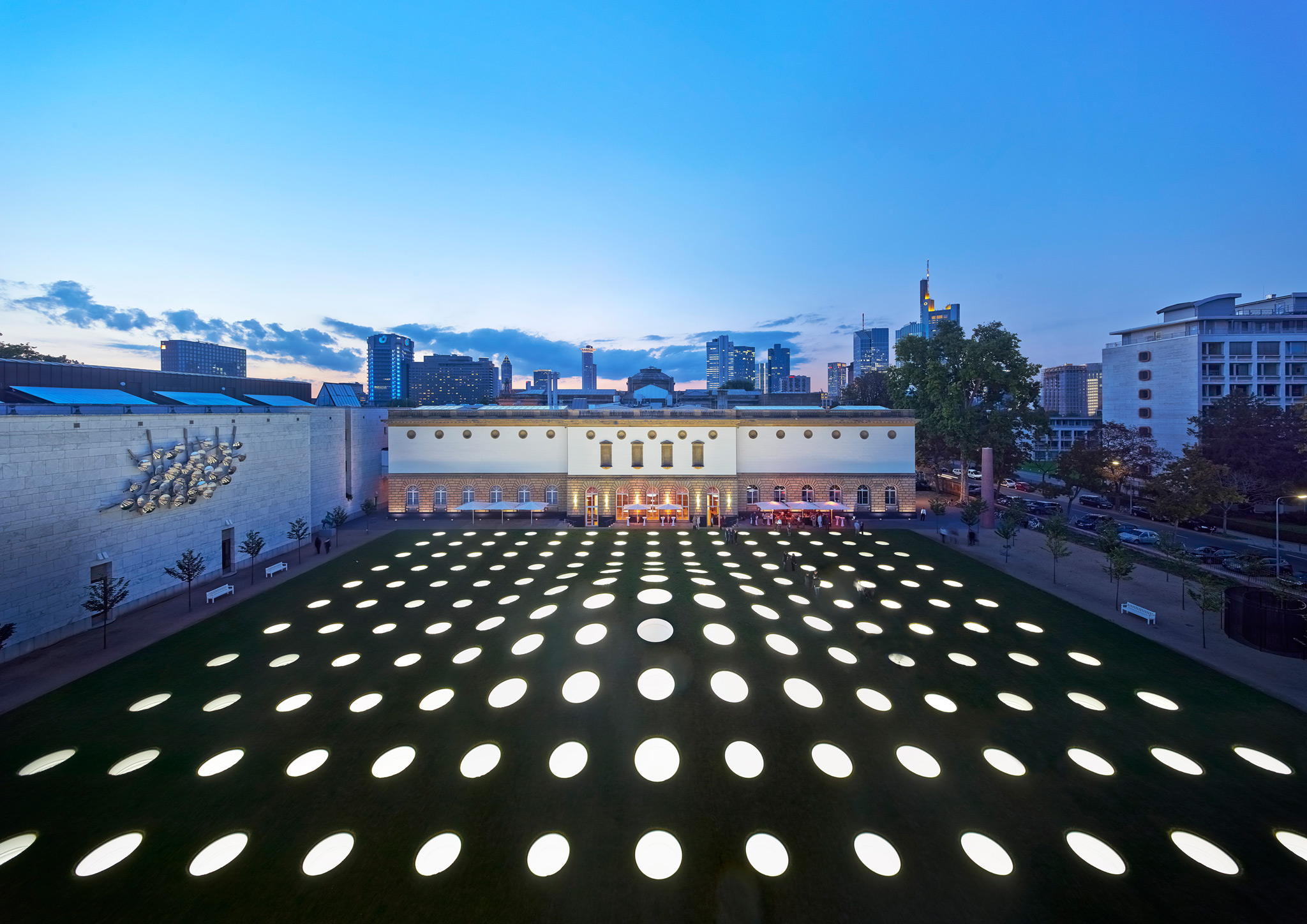 Die unter dem Städel Garten platzierte lichtdurchflutete Ausstellungshalle bringt rund 3.000 m² zusätzliche Ausstellungsfläche für die Sammlung der Gegenwartskunst und verdoppelt den Umfang der Sammlungspräsentation.